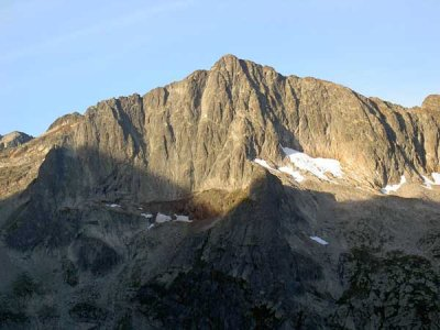 Pico Spijeoles. Vista desde el Gran Quaidrat Esta imagen ha sido tomada personalmente por Avh